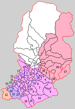 山梨県東八代郡の町村。